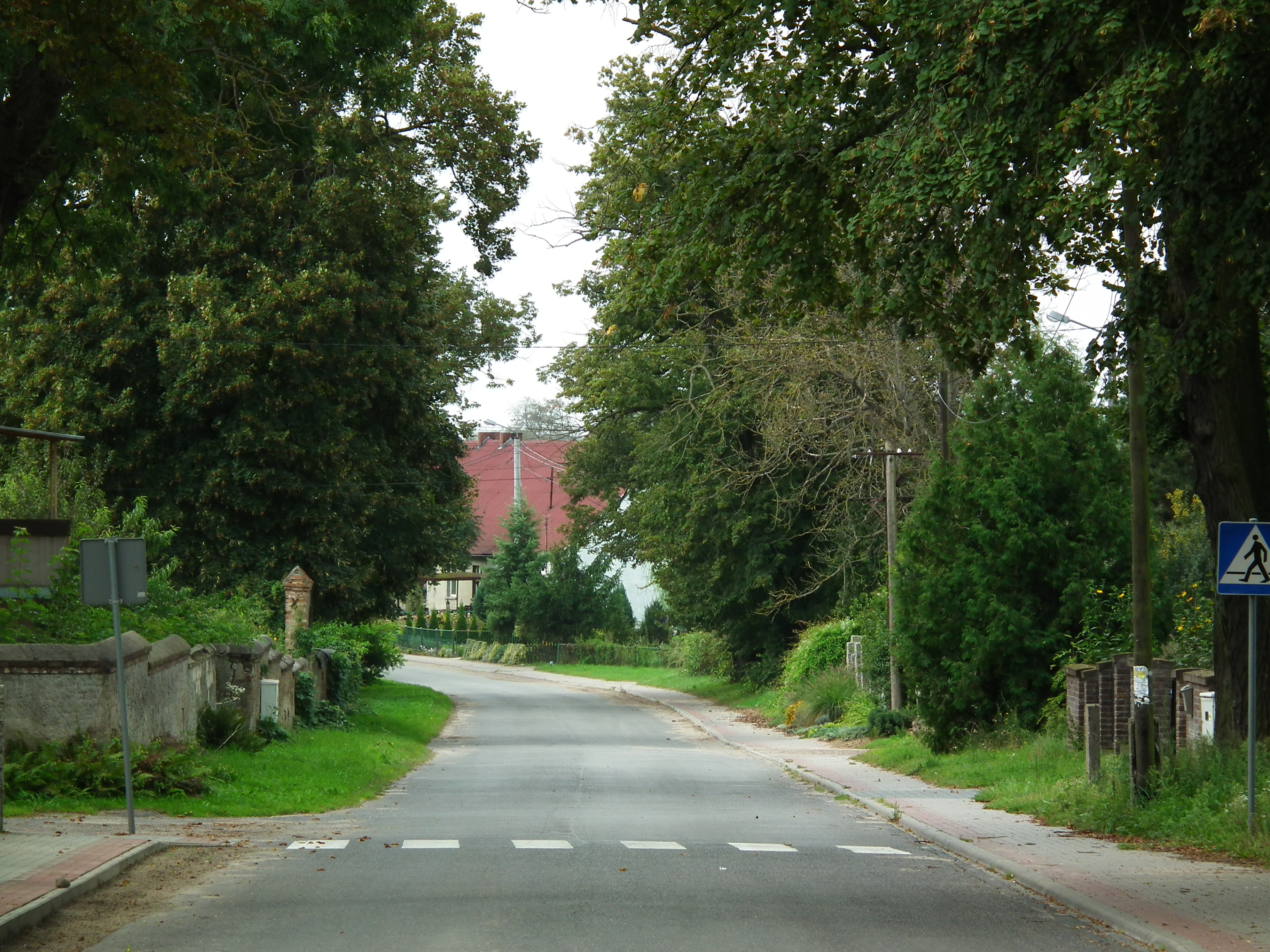 Sędziny.